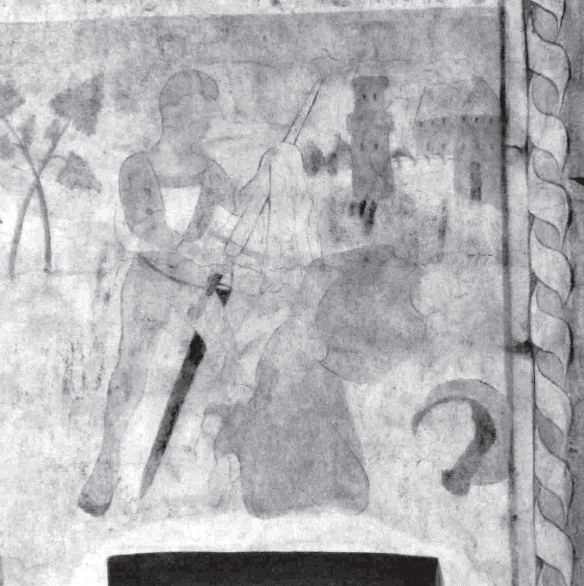 Фрагмент фрэскі «Цуд Св. Георгія» з меркаванай выявай Полацкага касцёла бернарзінцаў на Запалоцці, школу якога наведваў Ф. Скарына. 1580-я